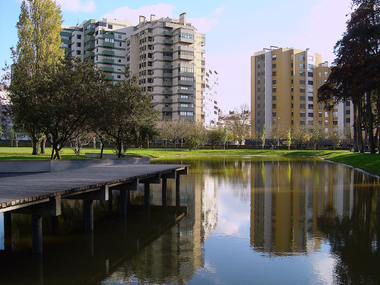 Quinta das Conchas, em Lisboa, PortugalLisboa - Portugal